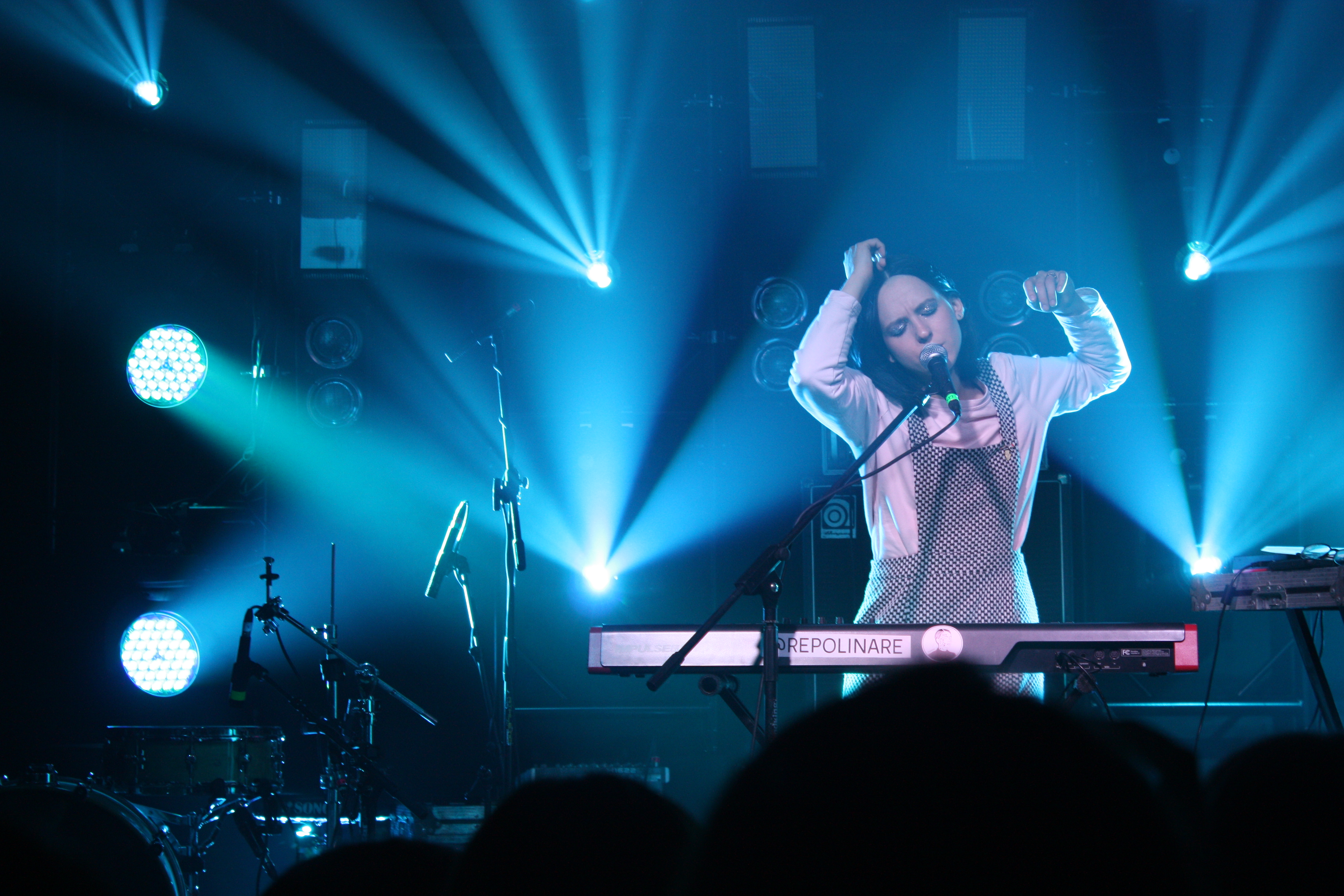 Razomfest 2018 у Львові